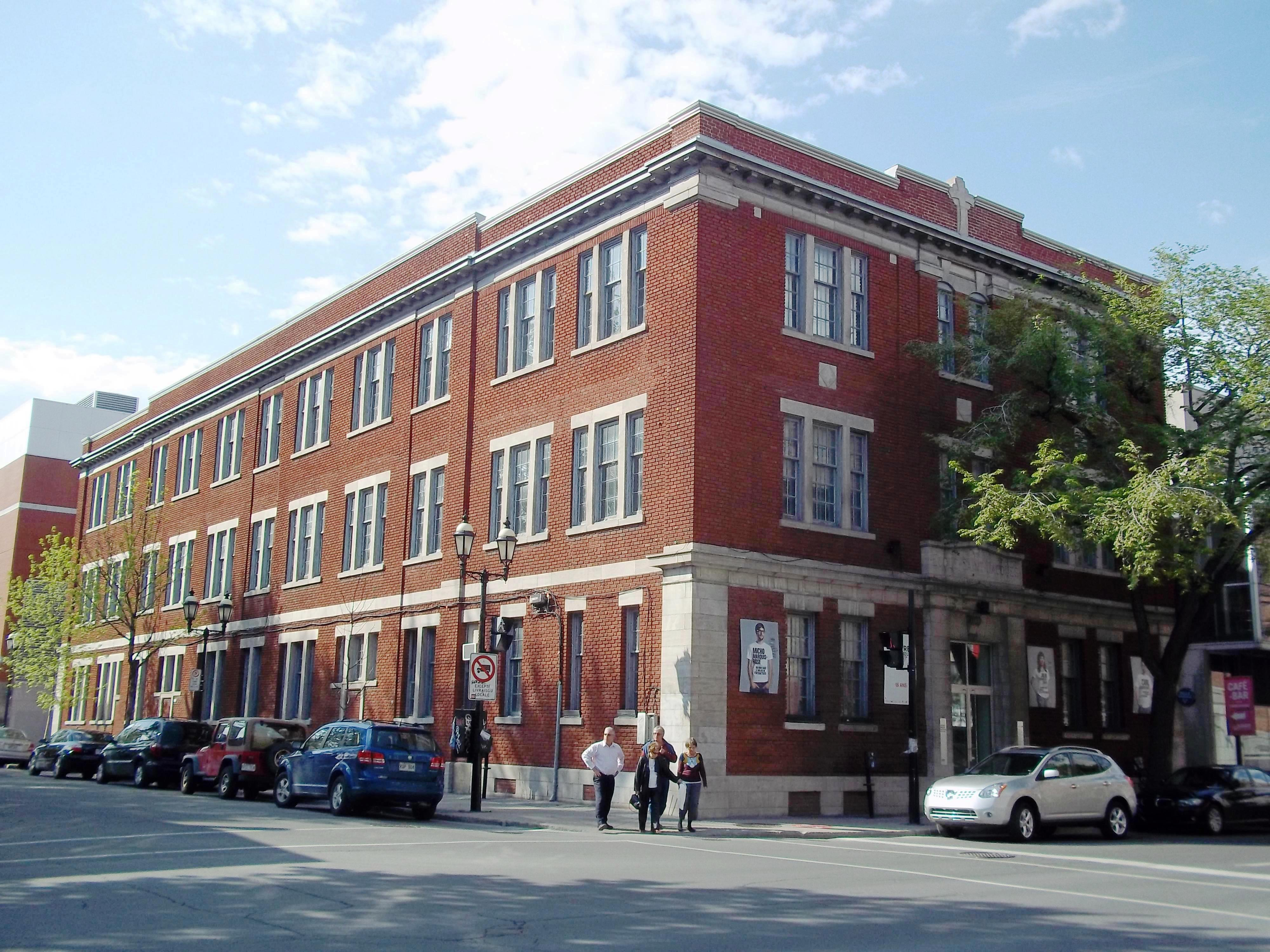 Institut national de l'image et du son, 301, boulevard De Maisonneuve est, Montréal